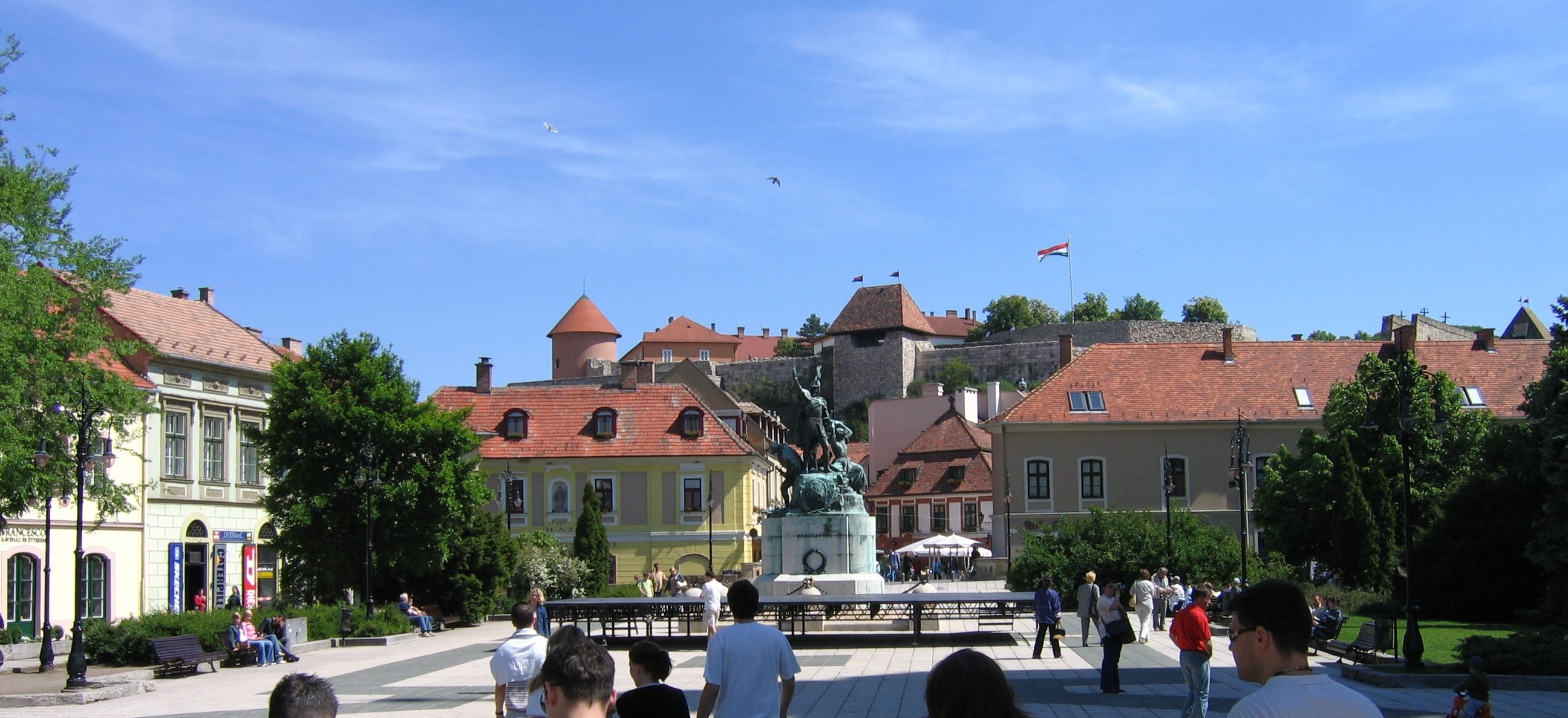 Dobó Square, Eger, Hungary